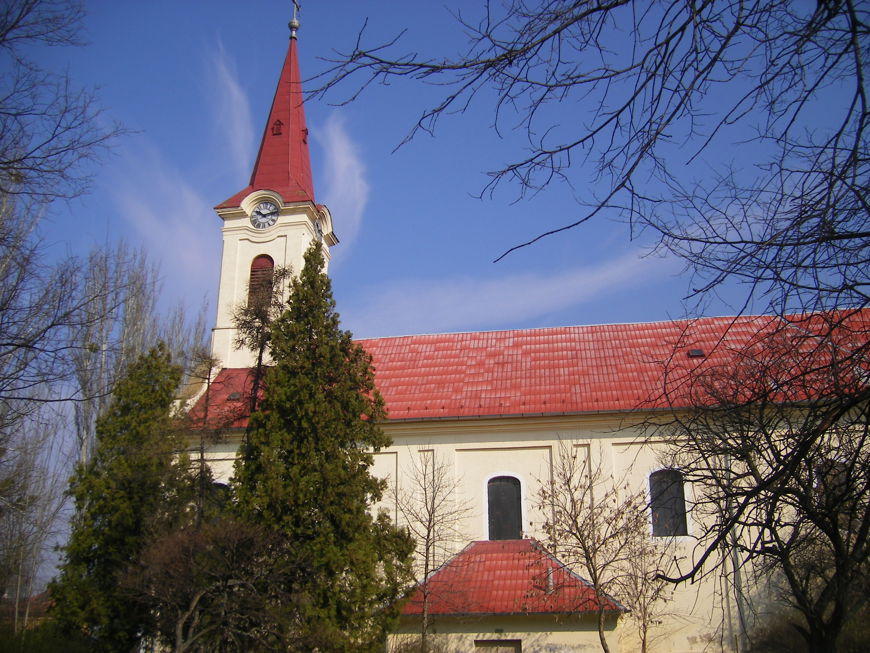 Gúta, római katolikus templom